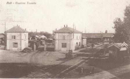 Asti, cartolina stazione